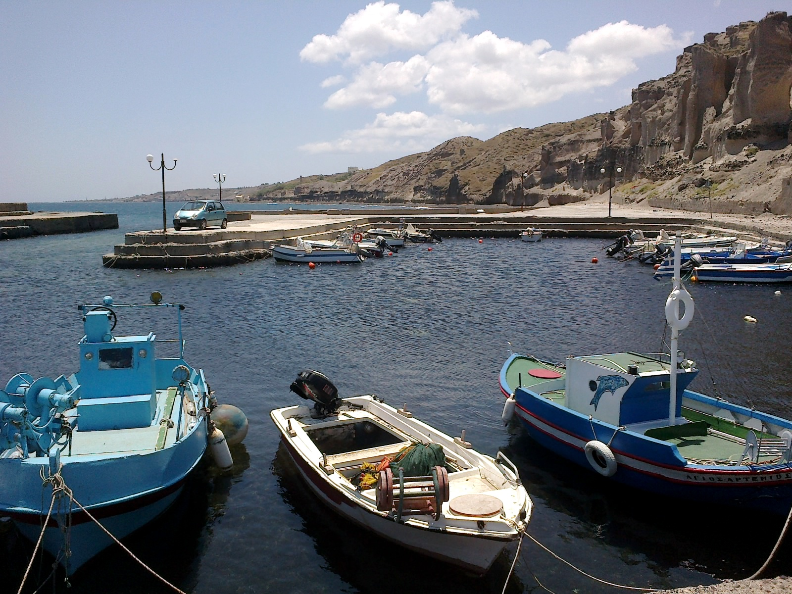 Cyclades Santorin Vourvoulos Port 15062013